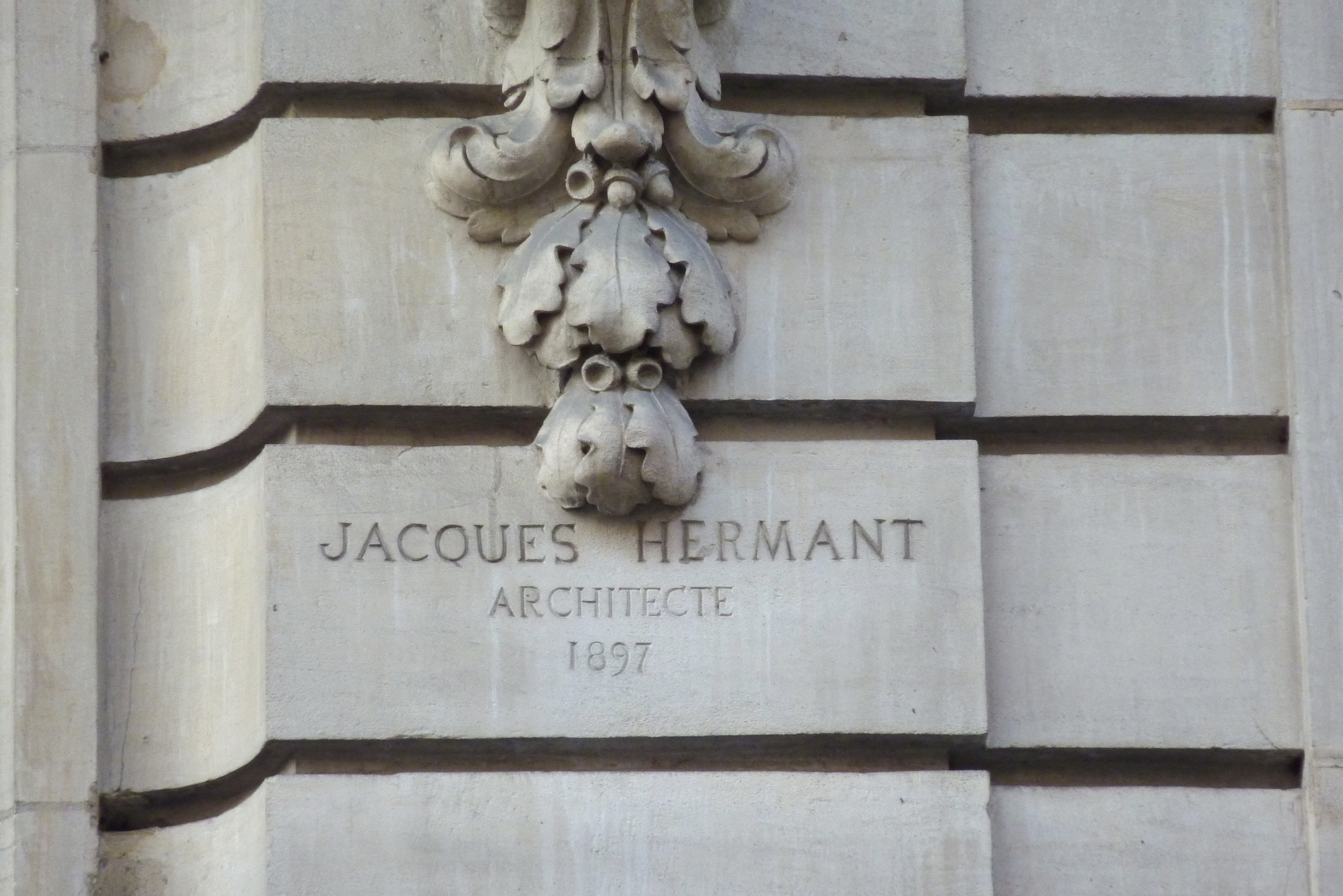 Haus 57 rue du Faubourg-Poissonnière in Paris (9. Arrondissement), Inschrift: "JACQUES HERMANT ARCHITECTE 1897"